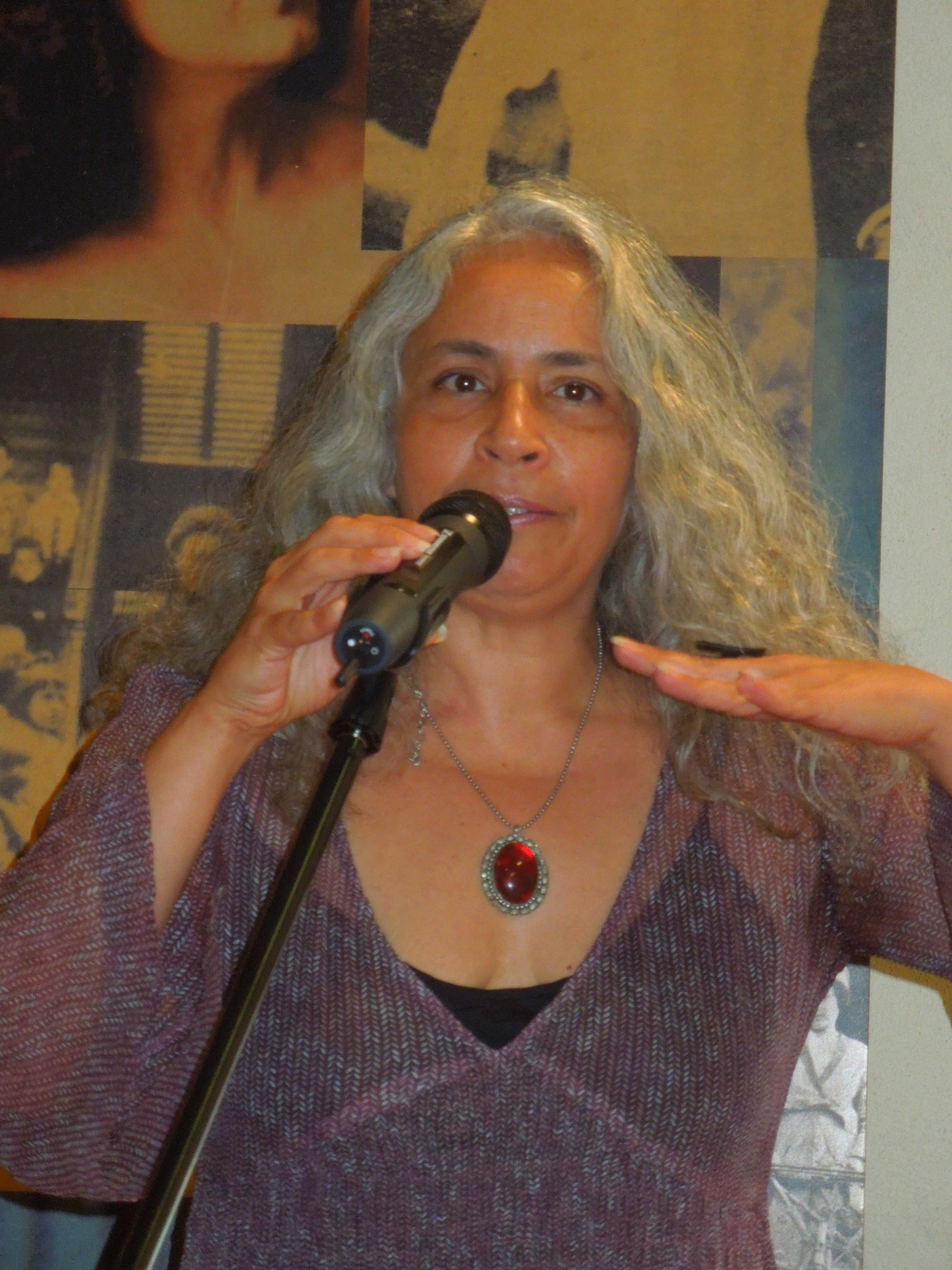 Retrato